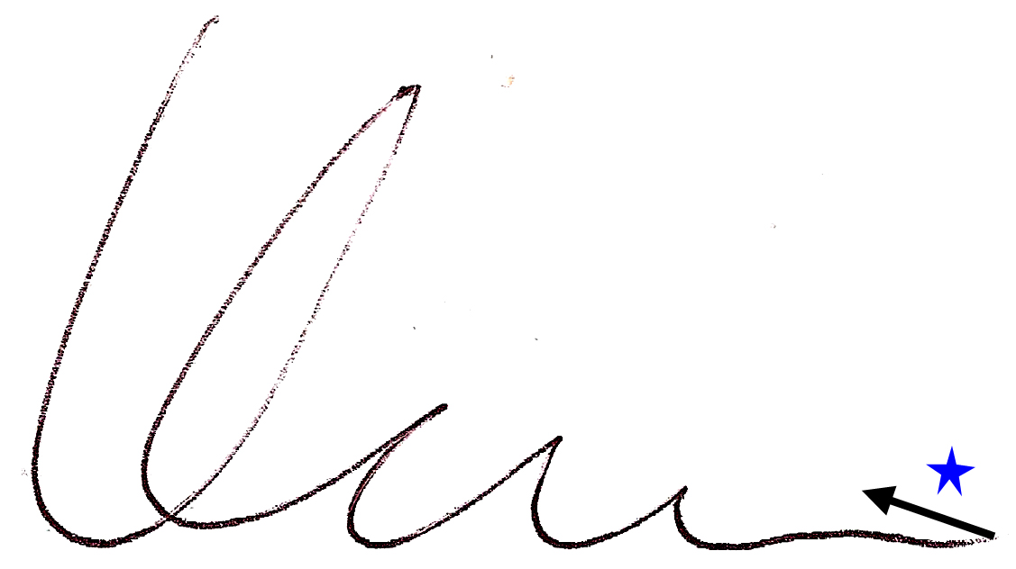 Ersetzung der querenden Rückführung